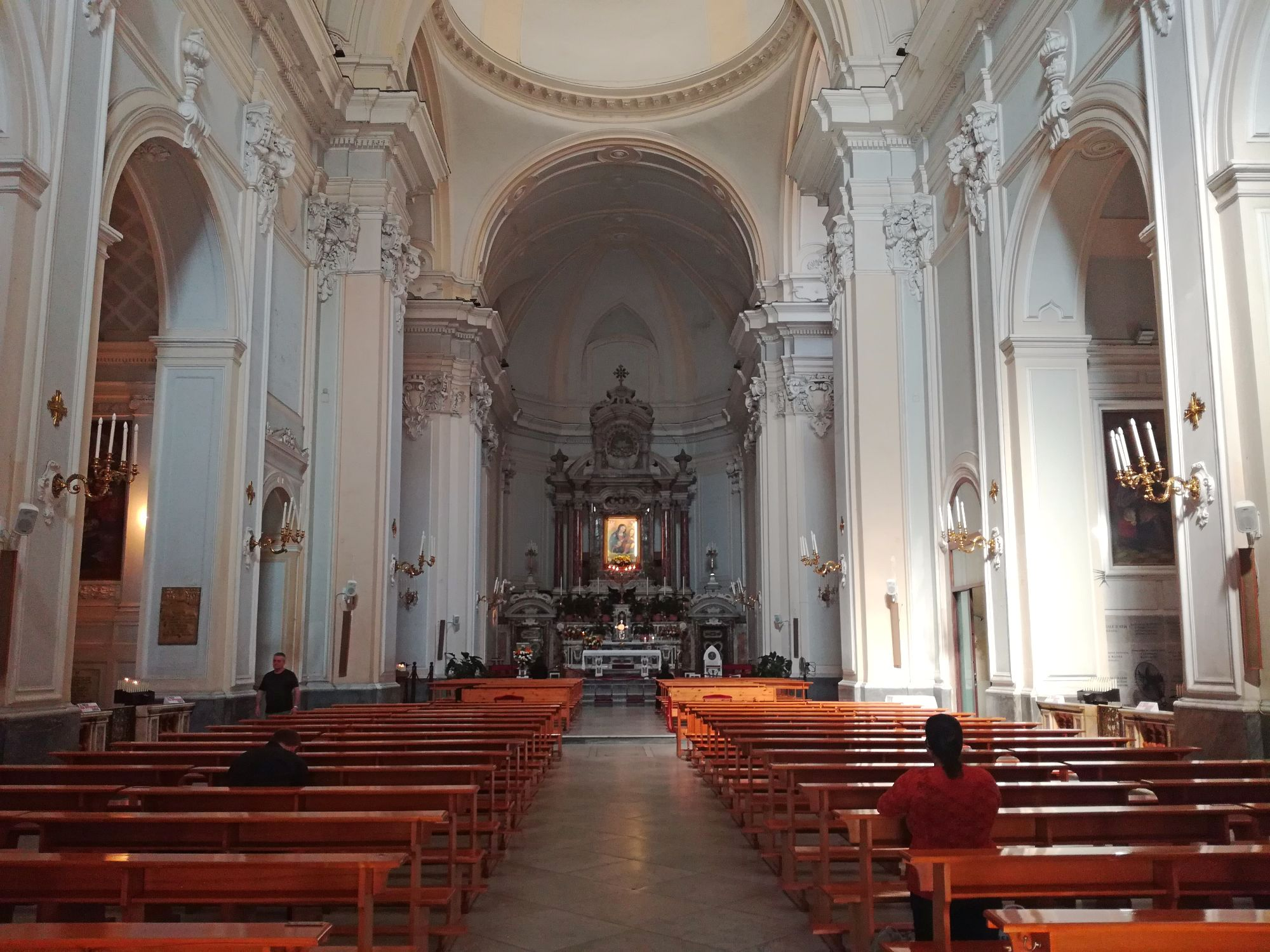 Interno, Santa Maria di Montesanto, Napoli